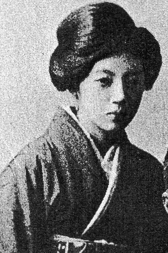 内村美代子（1924年）